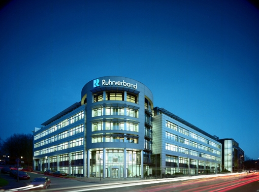 Neues Ruhrhaus bei Nacht. Hauptverwaltung des Ruhrverbands in Essen